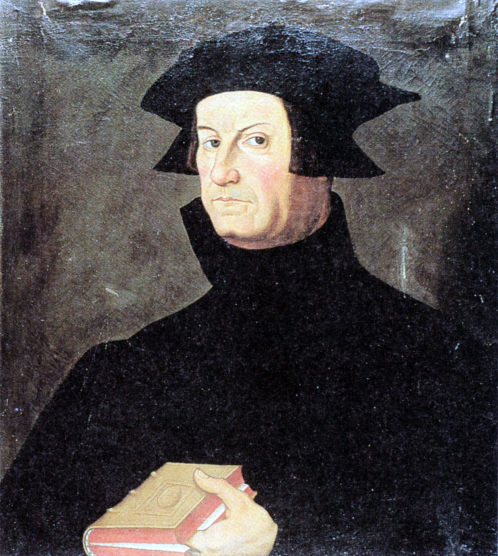 Ölgemälde eines unbekannten Künstlers von Leo Jud, Leutpriester von St. Peter in Zürich, Schweizer Reformator.